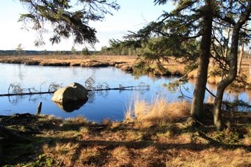 Björnsjön på Komosse, sedd från Björnön.